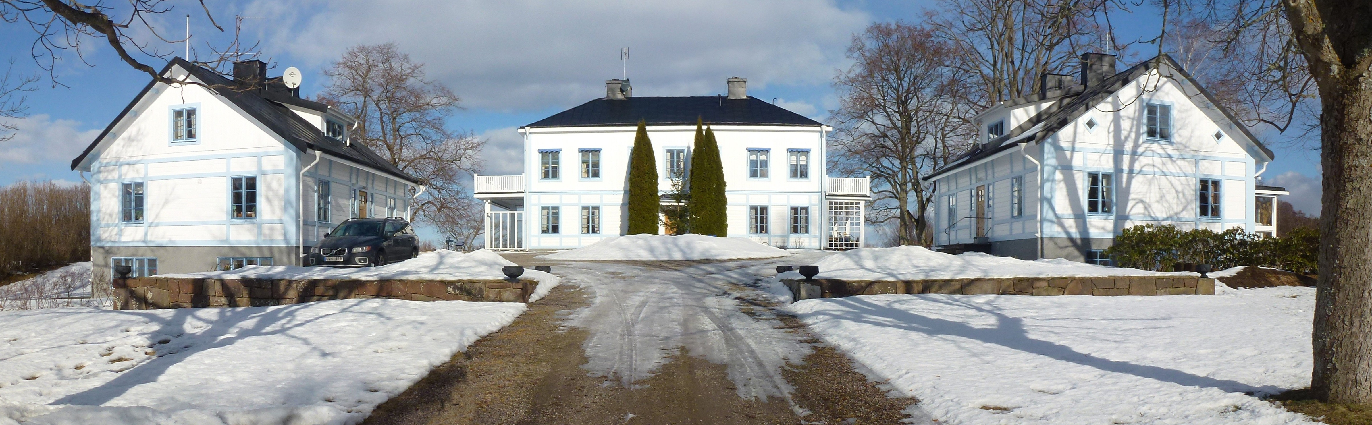 Bockholmssättra Salems kommun